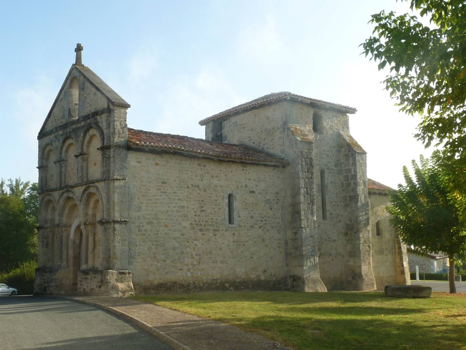 église de Boresse (17), France